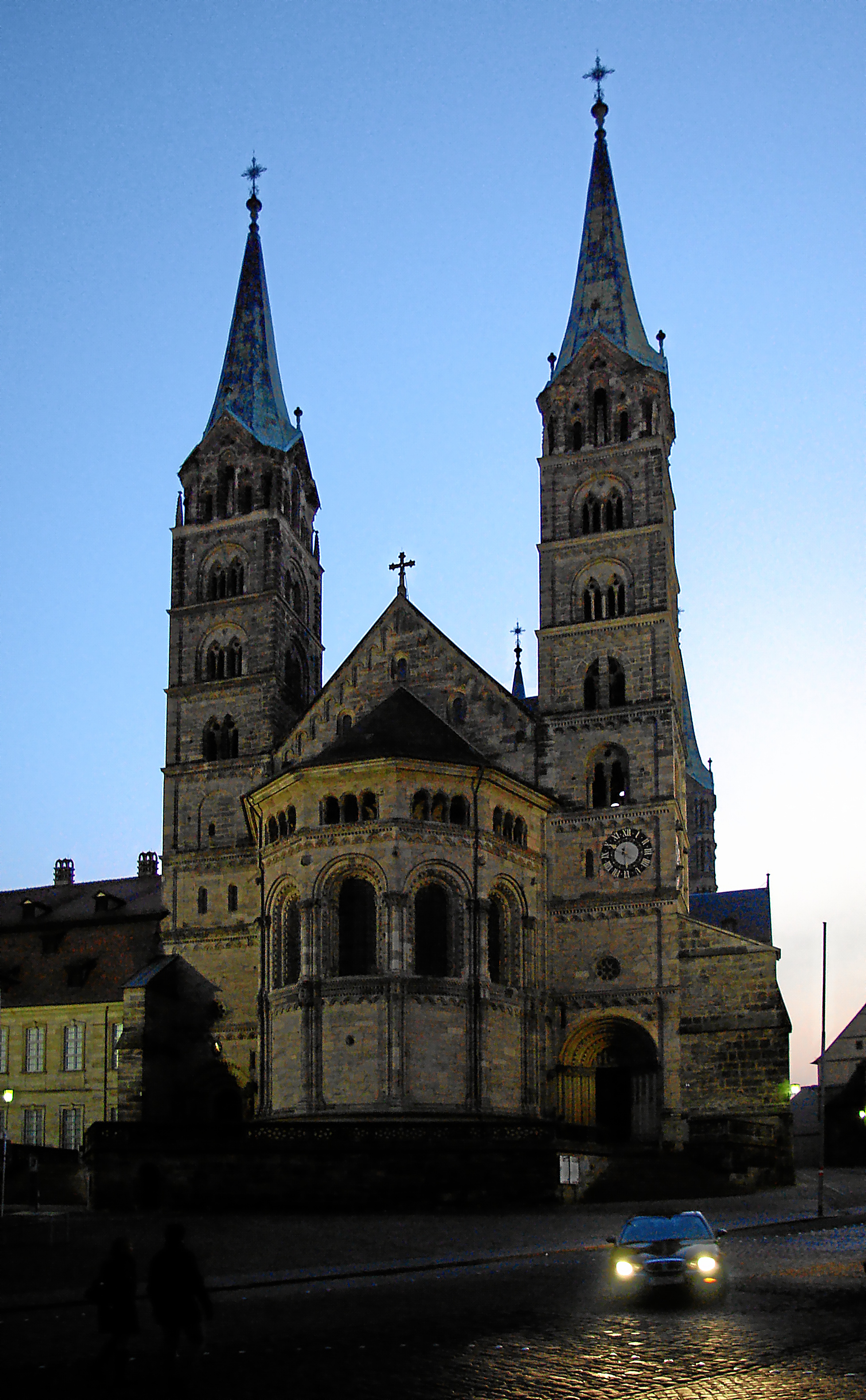 Bamberger Dom am Abend